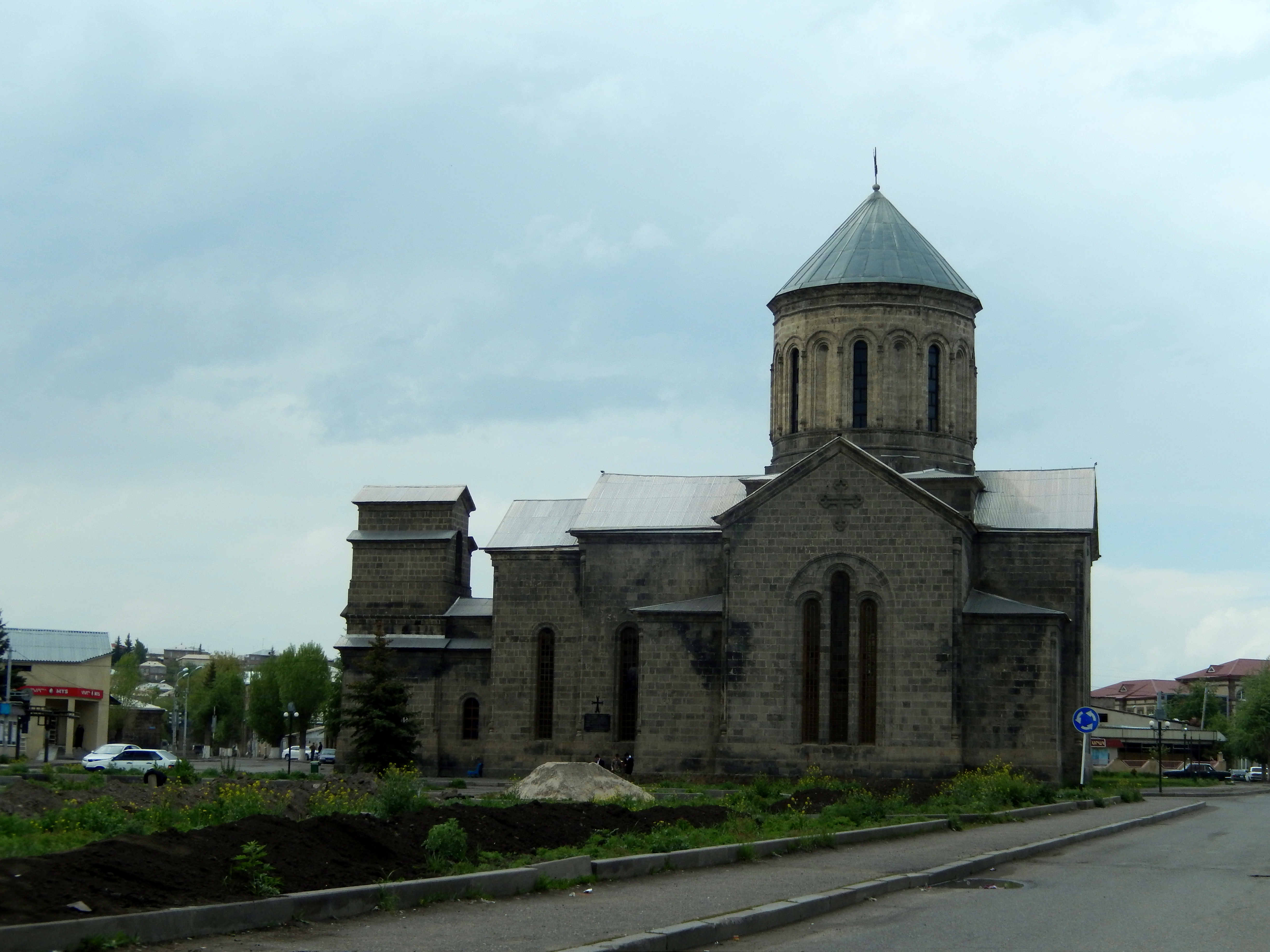 Գավառի Սբ. Աստվածածին եկեղեցի 1/20